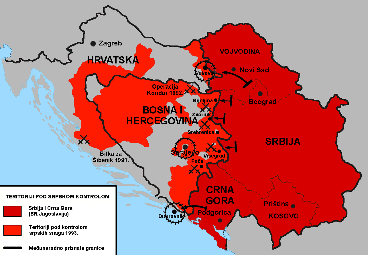 Teritoriji pod srpskom kontrolom 1993.